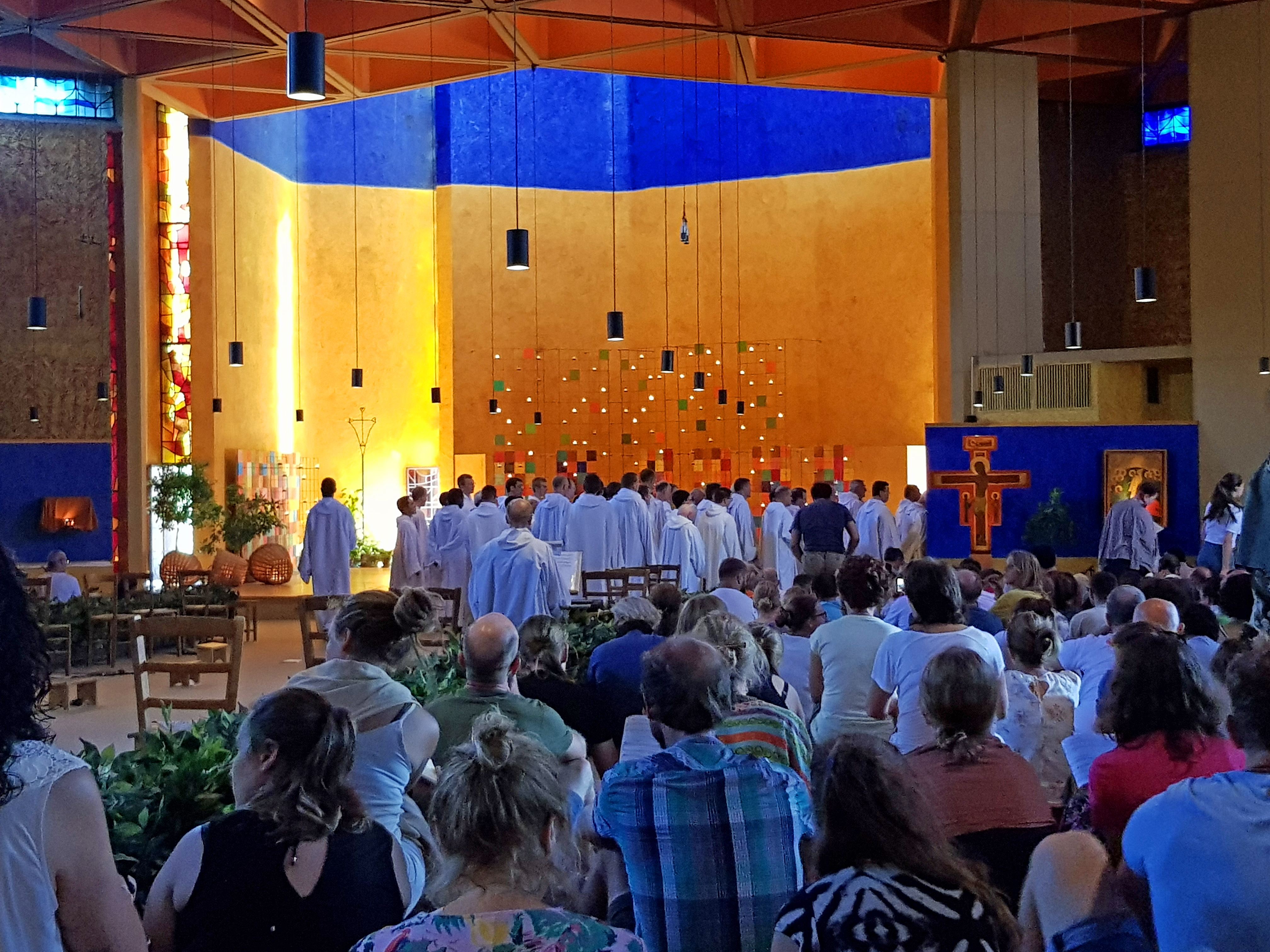 Mittagsgebet in der Versöhnungskirche in Taizé